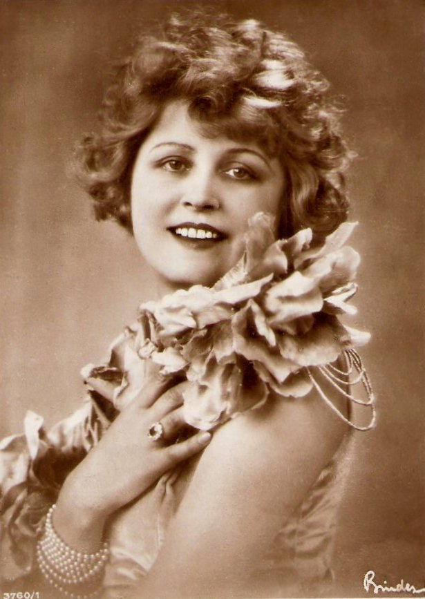 Ксения Десни